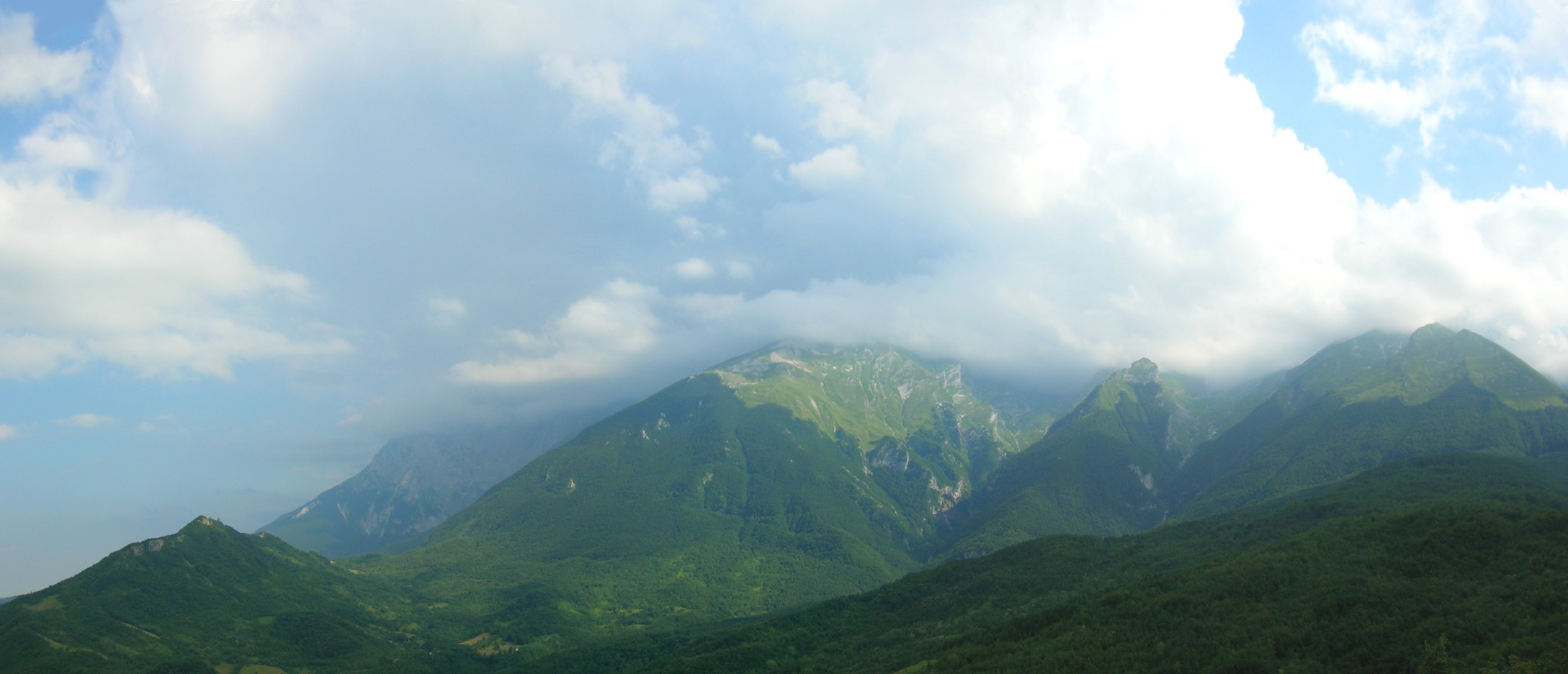 Panorama Isola del Gran Sasso d'Italia